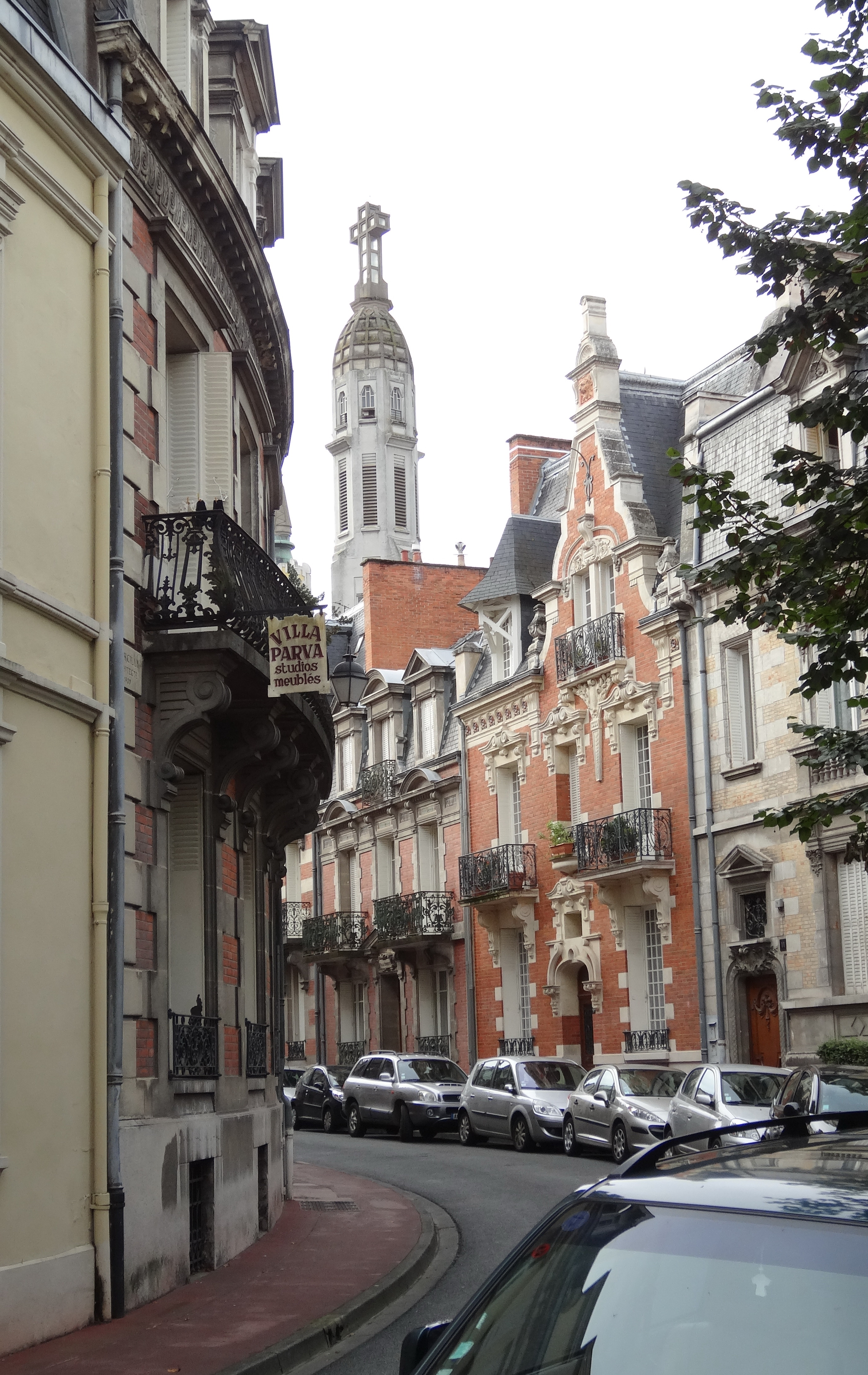 Rue Hubert-Colombier - Vichy - Belles villas de tous styles